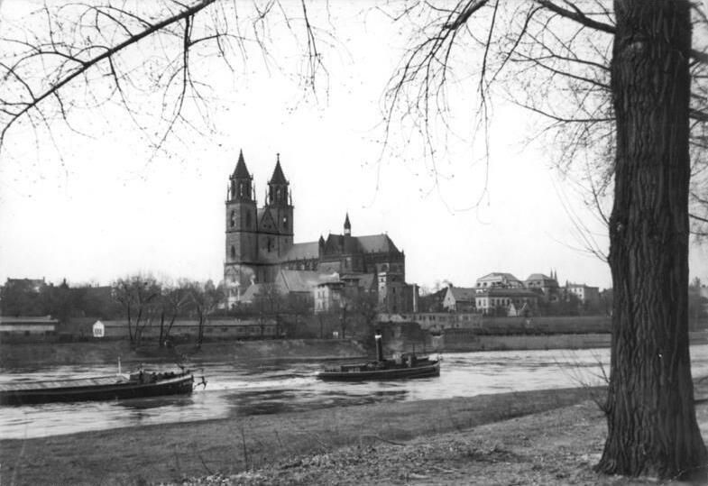 Durch Verbesserungen im Elbverkehr werden jährlich grosse Summen eingespart UBz, Blick auf den Magdeburger Dom und die gefährliche Stromstelle. Eben schleppt ein Motorschiff einen Kahn im stevenrechten Talverkehr am Domfelsen vorbei. (Siehe Begleittext) Zentralbild-Biscan Ra-Ho. 14.4.1954